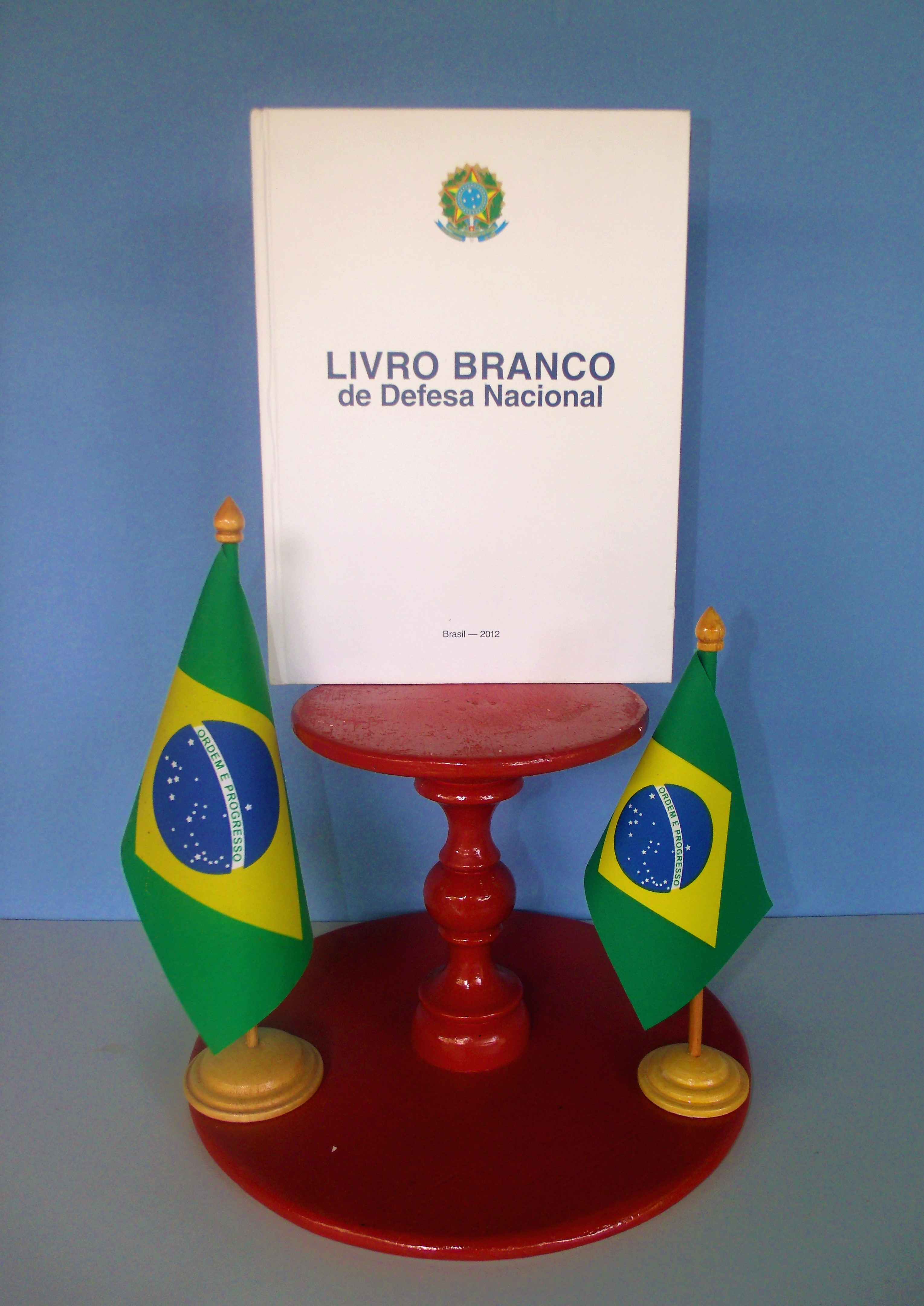 Edição de 2012 do Livro Branco de Defesa Nacional